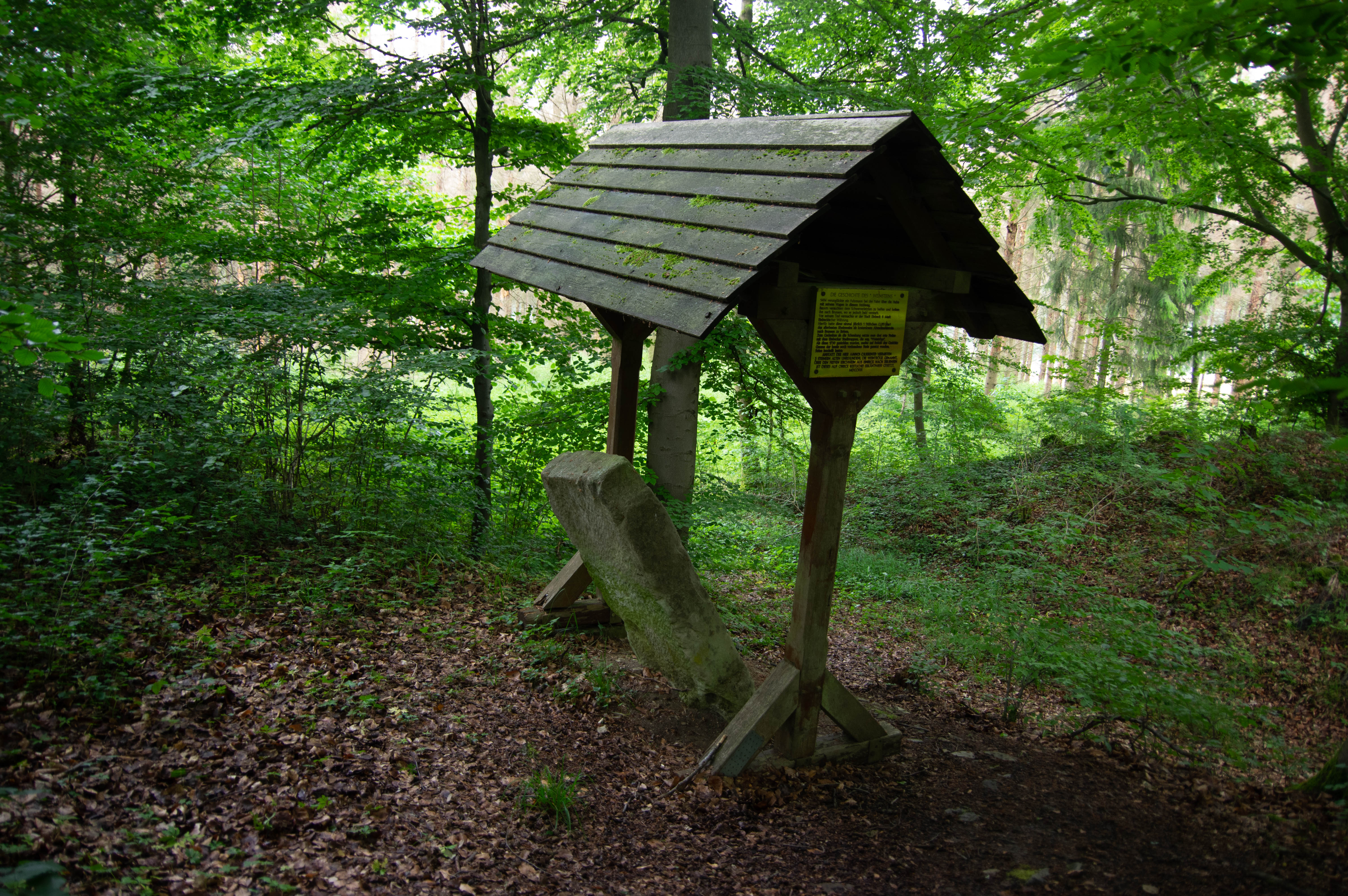 Einbeck, Ortsteil Brunsen in Niedersachsen.Der Weinstein ist ein Gedenkstein, der an einem Unfall im 15. Jahrhundert erinnert.